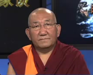 8th Agya Rinpoche, Lobsang Tubten Jigme Gyatso